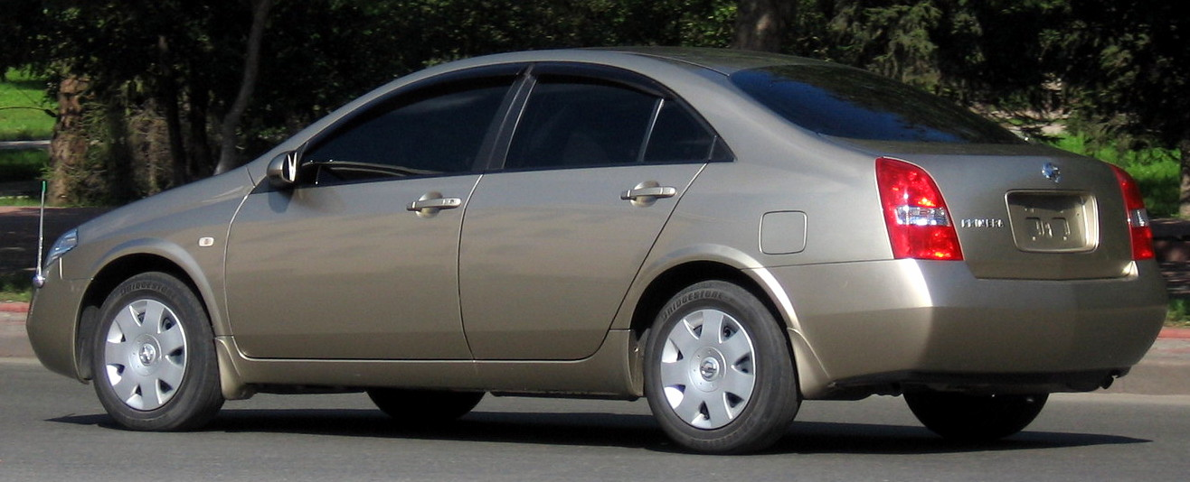 Photo taken in Tomsk, Russia